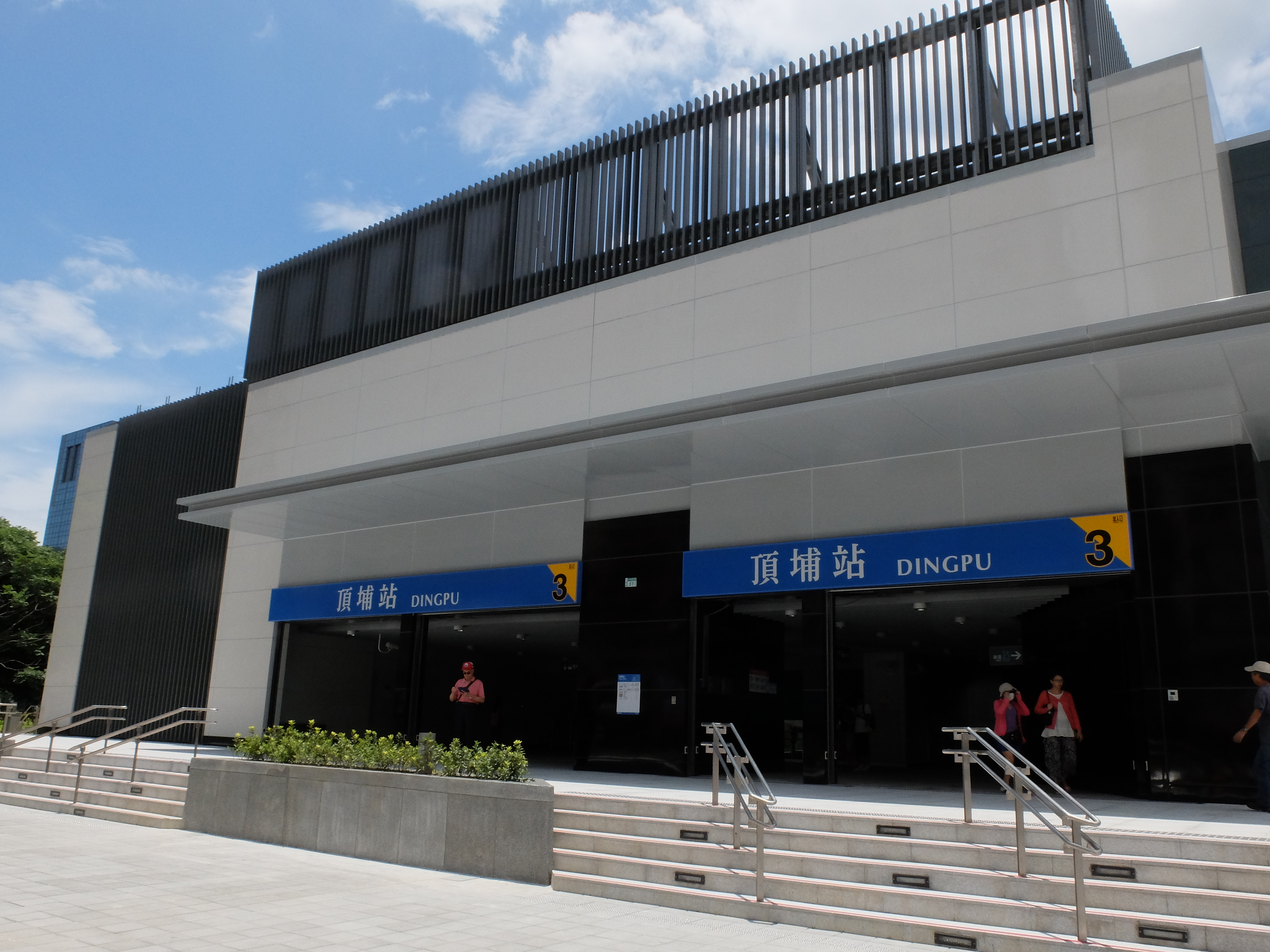 台北捷運頂埔站出口3外觀。